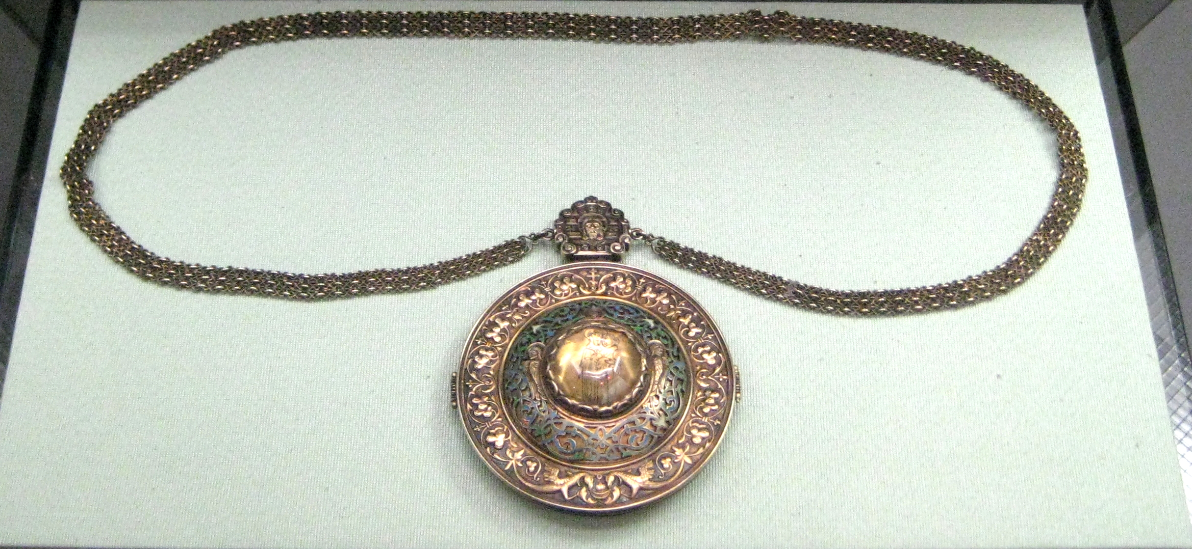 Панагия с цепочкой. Москва,к. 19 - нач. 20 века. Фирма "П.И. Оловянишникова сыновья". Серебро, топаз. Эмаль, золочение, резьба. Копия панагии патриарха Гермогена, пожалованной ему царем Василием Ивановичем Шуйским. ГММК. Оригинал - ММК (Россия, 1603 г.) Серебряная золоченая панагия 1603 года привлекает внимание своим внушительным размером, древней двустворчатой формой и необычным изображением Богоматери с Младенцем на руках. Оно выполнено черным лаком на позолоченной тыльной стороне хрусталя.